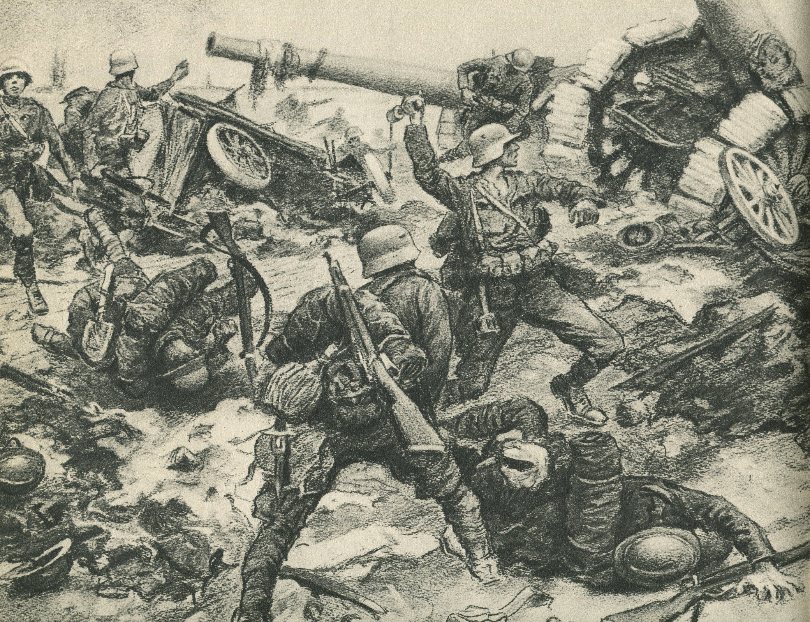 Nach dem Durchbruch von Tolmein. Österreichische Infanteri im Kampf mit italienischen Truppen